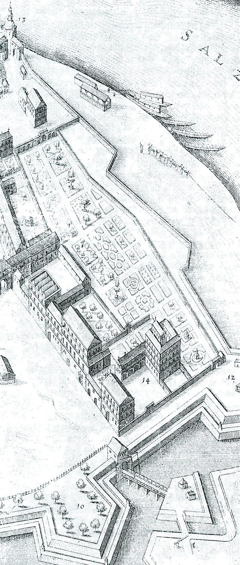 Salzburg von Norden, Ausschnitte der Karte von Ph. Harpff von 1643 mit Schloss Altenau